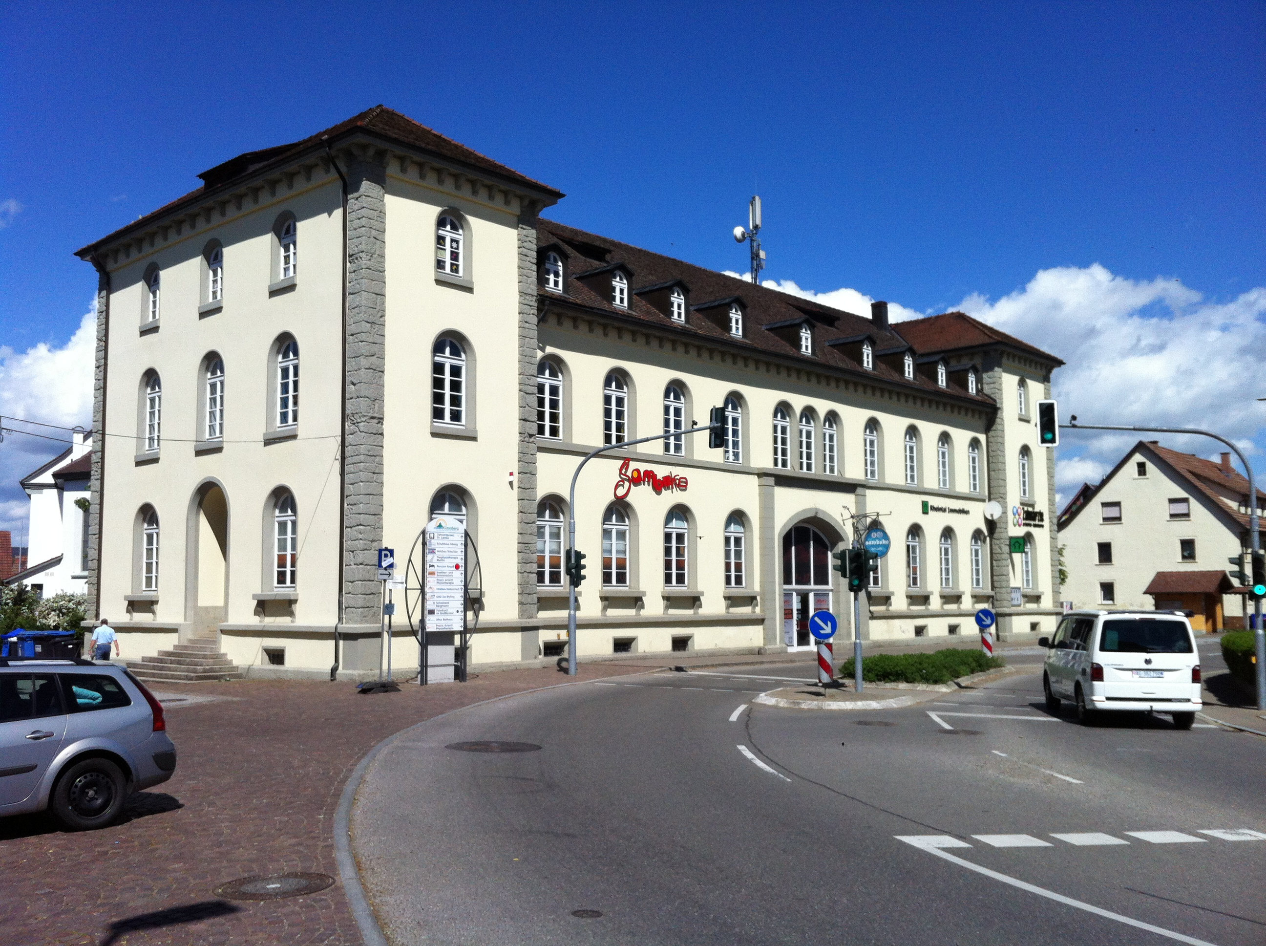 KB Küssaberg, Gemeinde im Landkreis Waldshut in Baden-Württemberg. Ortschaft Kadelburg, ehemaliges Zollhaus.